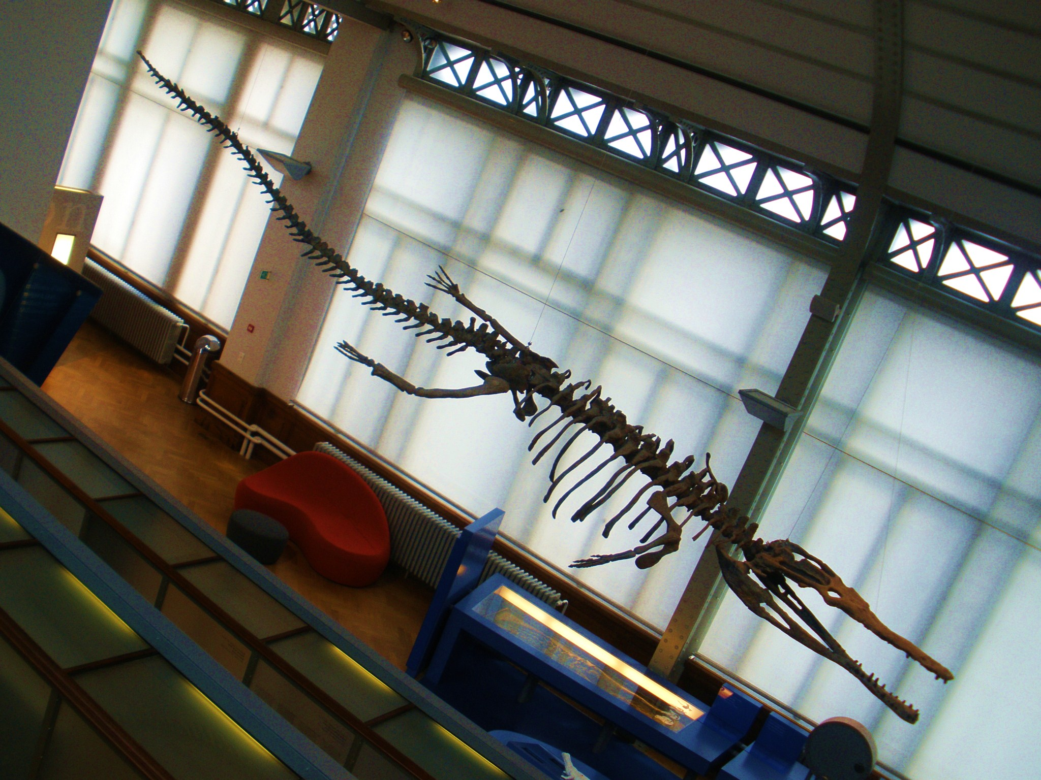 Fossil of Machimosaurus, an extinct crocodile Took the photo at Musee d'Histoire Naturelle, Brussels